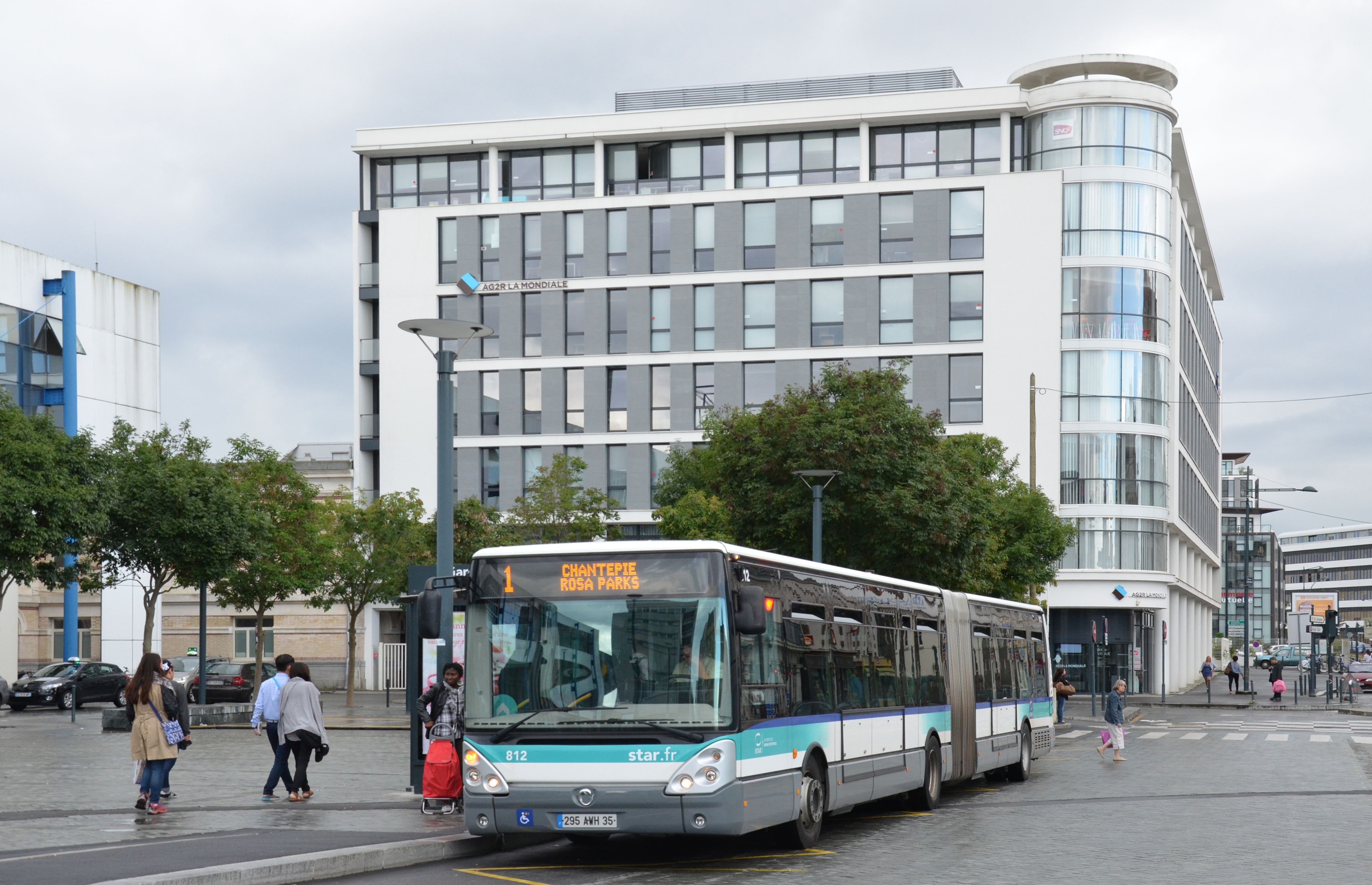 Irisbus Citelis 18 n°812 sur la ligne 1 du réseau STAR de Rennes, à l'arrêt Gares.